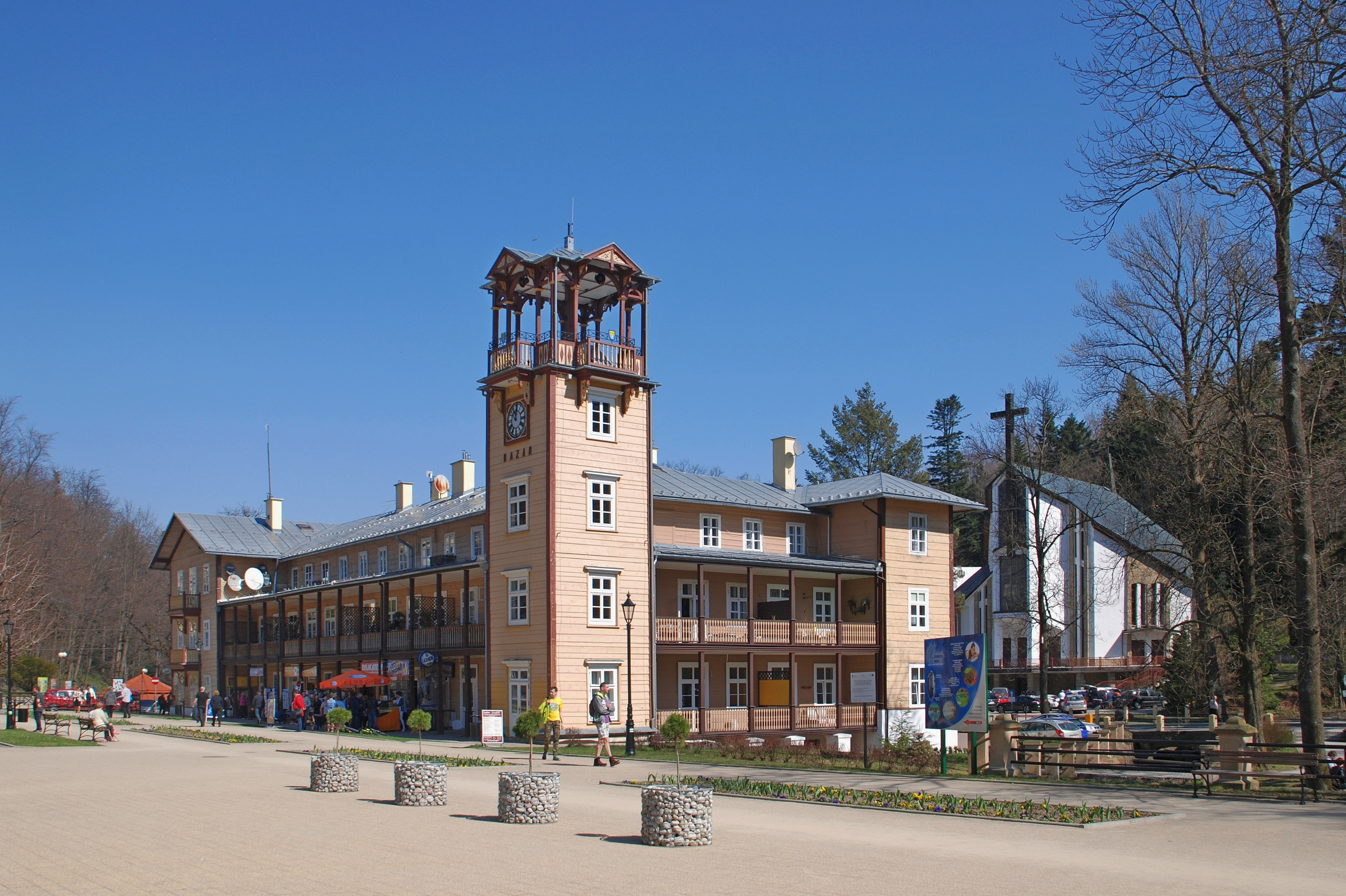 miasto Iwonicz-Zdrój